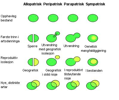 Figur som viser ulike former for naturleg artsdanning.